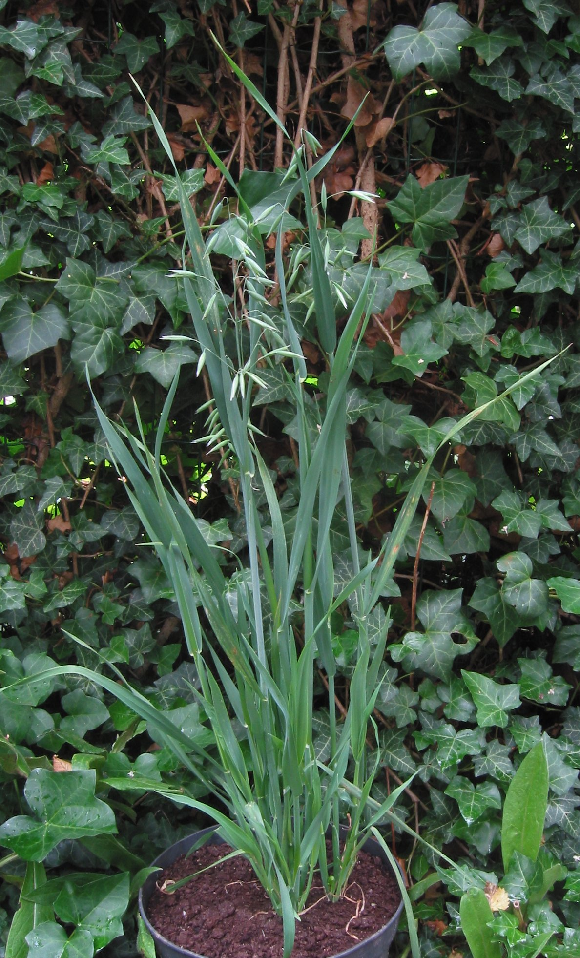 (Haver plant bloeiend) Avena sativa